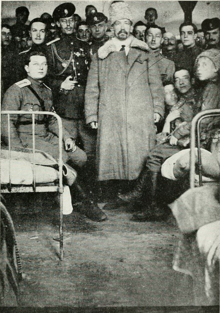 Генерал Корнилов с офицерами Корниловского полка. Справа от Корнилова — М.О. Неженцев. Позади Корнилова - капитан Заремба. Новочеркасск. 1918 г.